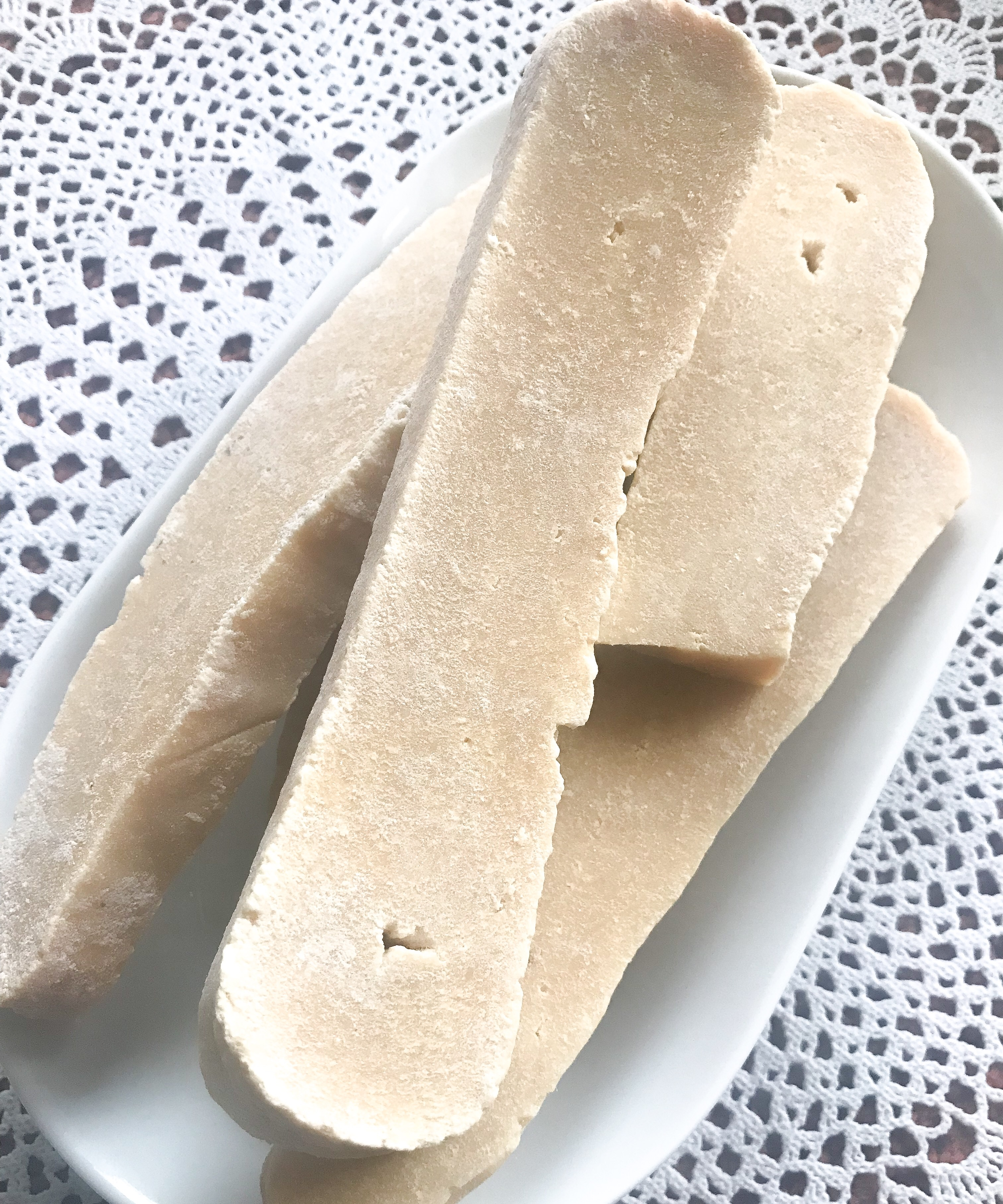 Obvyklý aaruul pocházející z Arkhangai, rok starý